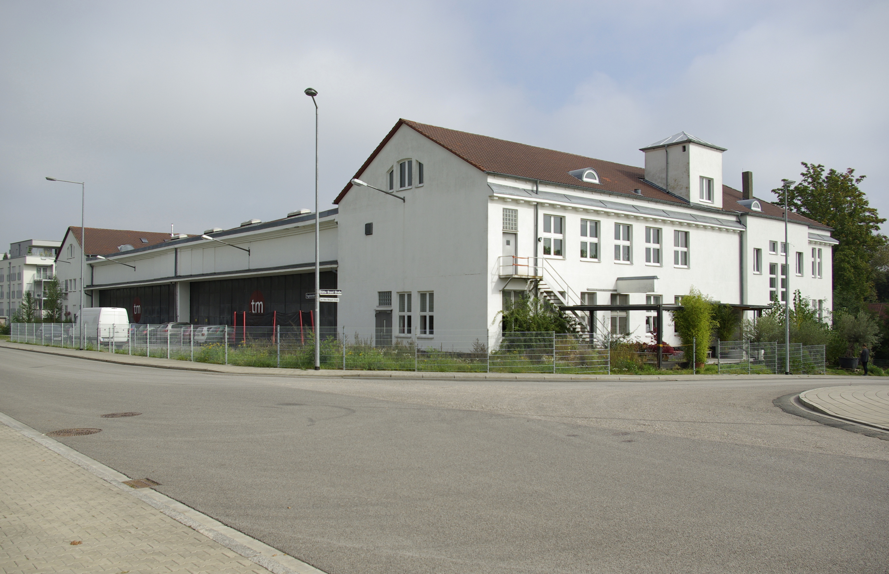 Ehemaliges Empfangsgebäude und Flugwerft (Gebäude Nr. 254) des ehemaligen Flughafens Nürnberg-Fürth in Fürth.